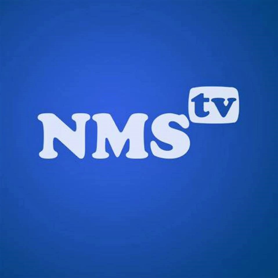 Das Logo von Neumünster TV.